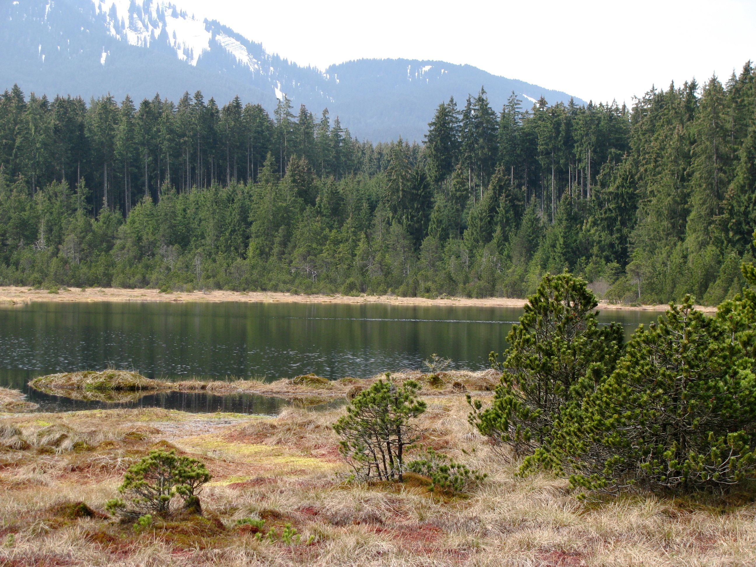 NSG Wildseefilz